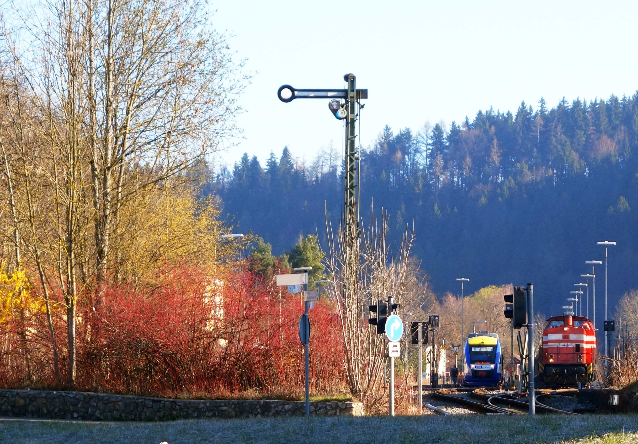 Der Triebwagen VT 214 "Schmiechen" der Bayerischen Regiobahn (Bauart LINT 41) und die Güterzuglokomotive AL 41 der Augsburger Localbahn (Bauart V 100) im Bahnhof Schongau, vor dem Ausfahrtsignal Richtung Süden (Richtung Weilheim bzw. Papierfabrik UPM-Kymmene)